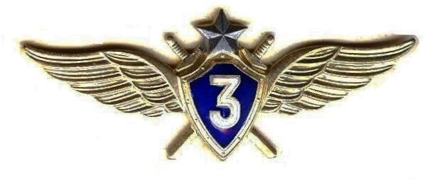 Нагрудный знак классной квалификации "Военный лётчик 3-го класса" образца 1995 года